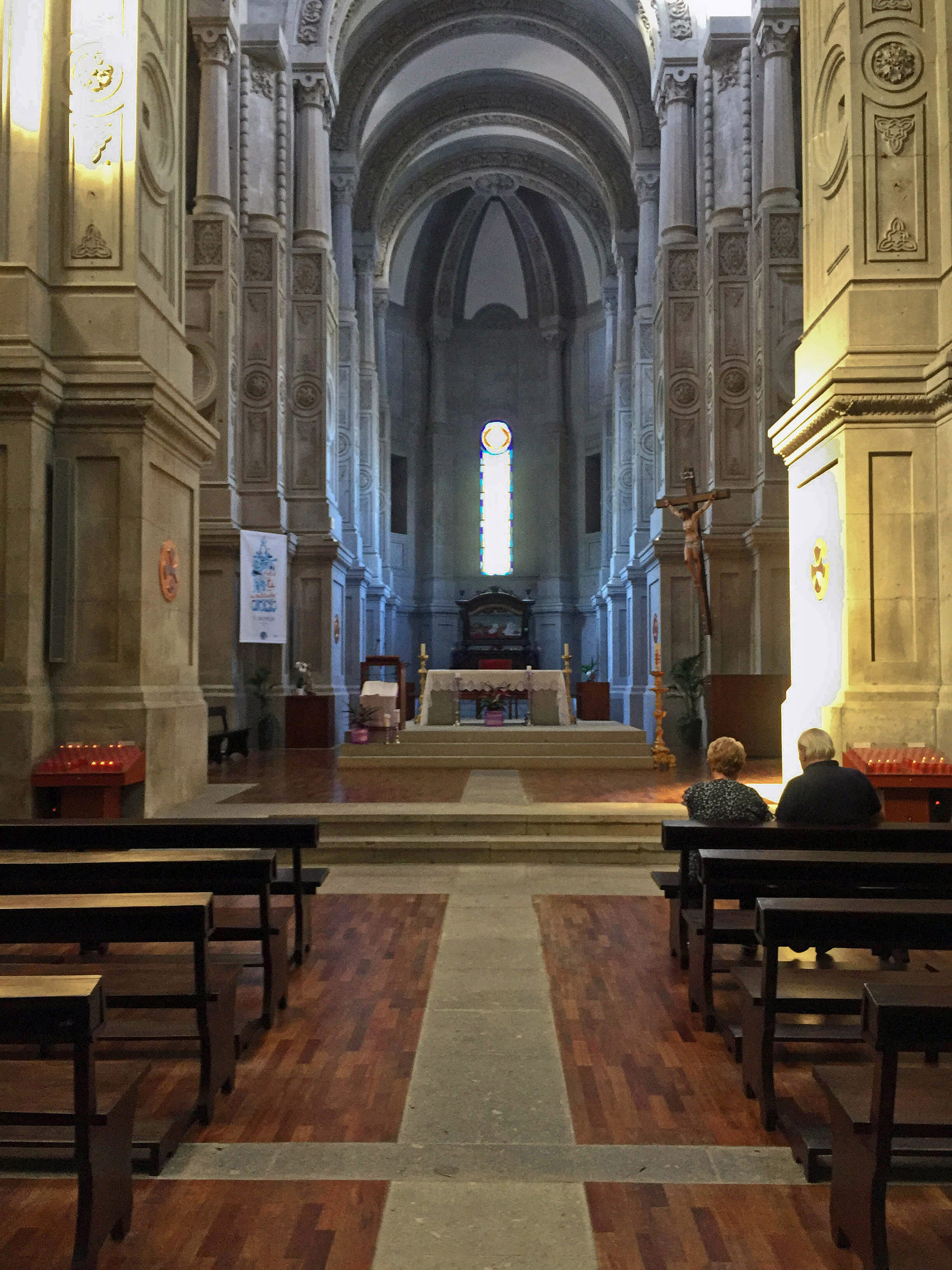 O Santuário de São Torcato é um santuário católico situado no vale central da freguesia de São Torcato (Guimarães), desenvolvendo-se à sua volta toda a povoação. O templo de estilo híbrido, com elementos clássicos, góticos, renascentistas e românticos, encontra-se todo construído em cantaria de pedra de granito da região, sendo uma obra-prima do neomanuelino, cuja construção se iniciou em 1871 e estende-se até aos dias de hoje. O gosto ecléctico, surge dentro do contexto da época, com predomínio de elementos decorativos neo-românicos. Possui dimensões consideráveis. A fachada é constituída por duas torres e um corpo central. Em planta, o templo tem a forma típica da cruz latina. No interior da Igreja encontra-se o corpo incorrupto do próprio São Torcato. No exterior do Santuário, encontra-se um adro o qual possui ao fundo, de frente para o Santuário, um parque enfeitado com frondosas tileiras e plátanos. Para aceder a este parque (denominado popularmente por Parque do Mosteiro), utiliza-se uma enorme escadaria, a qual dá ligação ao templo. No parque podemos também encontrar dois coretos, bem como duas grandes fontes de água.